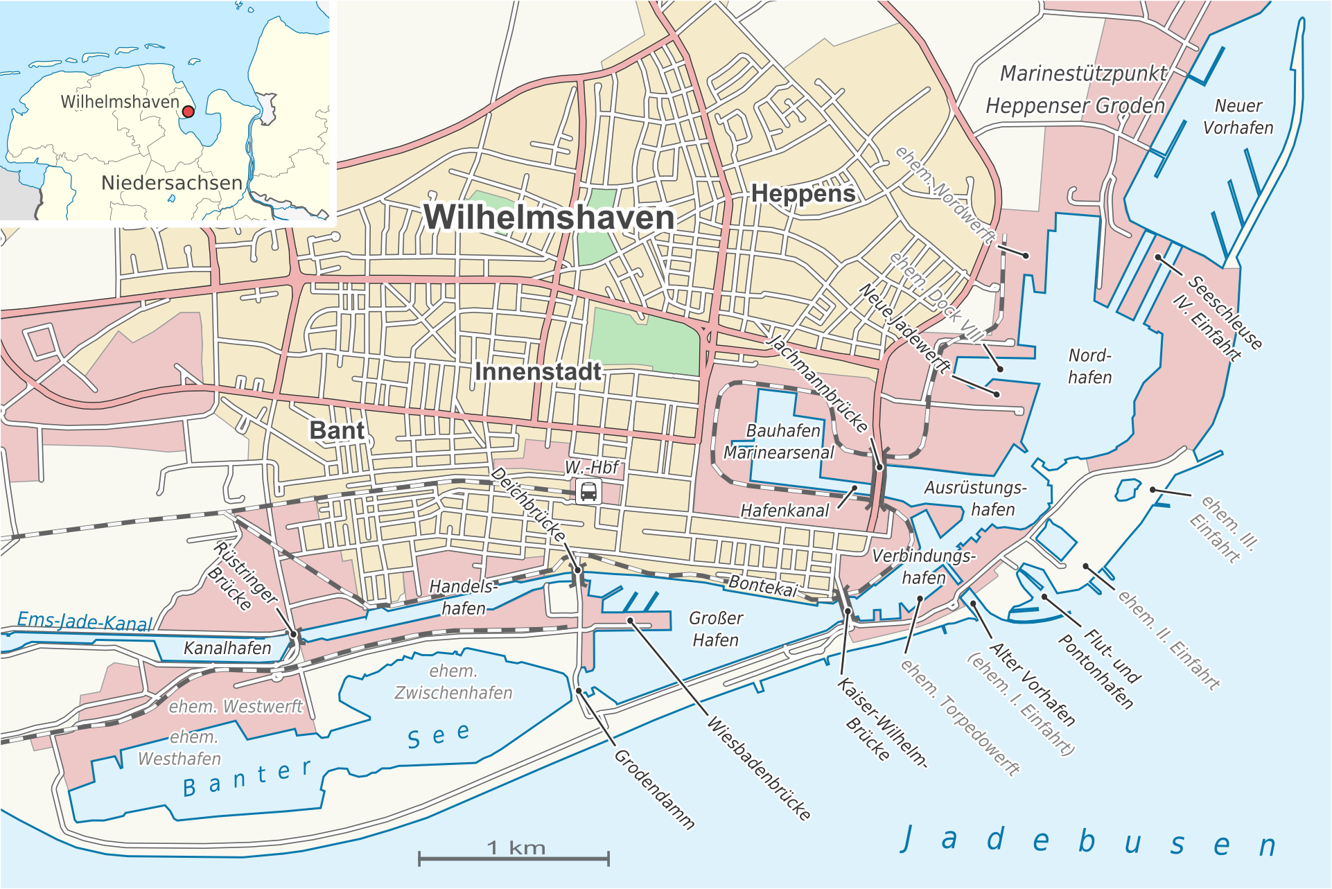 Detailkarte des inneren Hafenbereichs in Wilhelmshaven